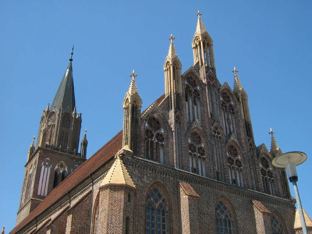 Die Marienkirche in Neubrandenburg - Giebel